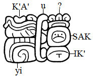 Majų glifo pavyzdys.